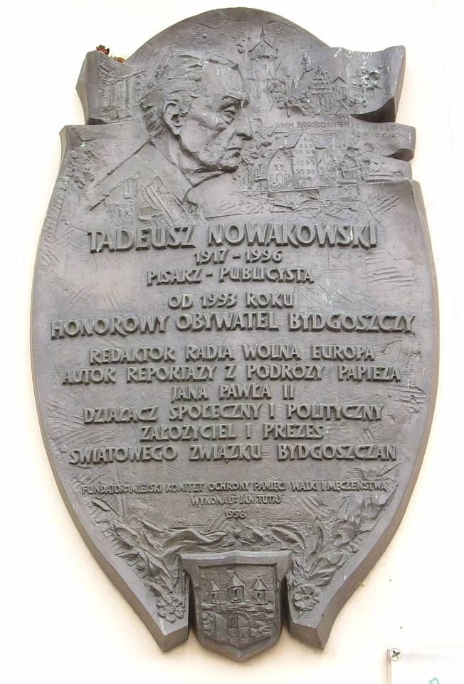 Tablica ku czci Tadeusza Nowakowskiego.